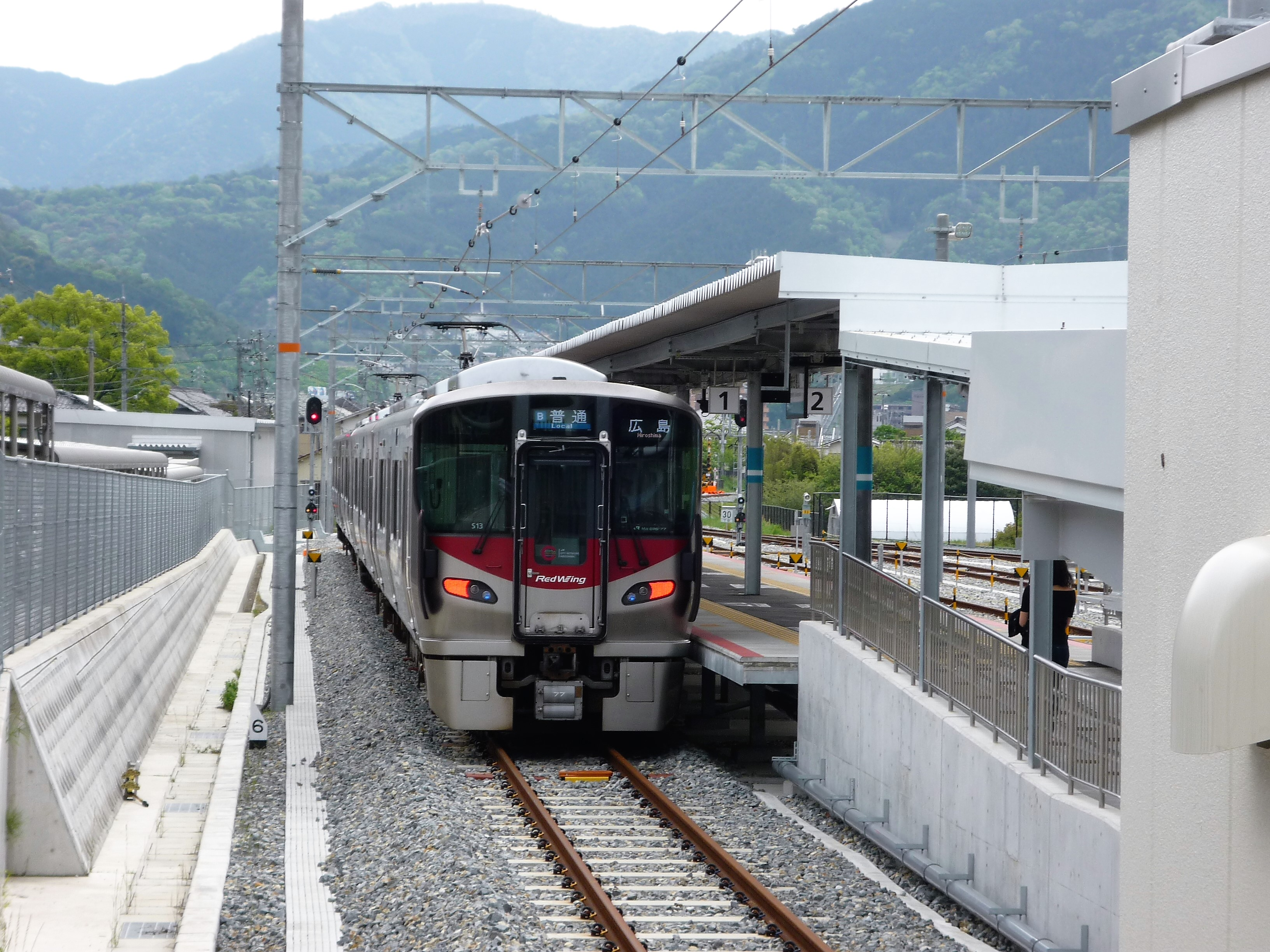 あき亀山駅に停車中の可部線普通列車